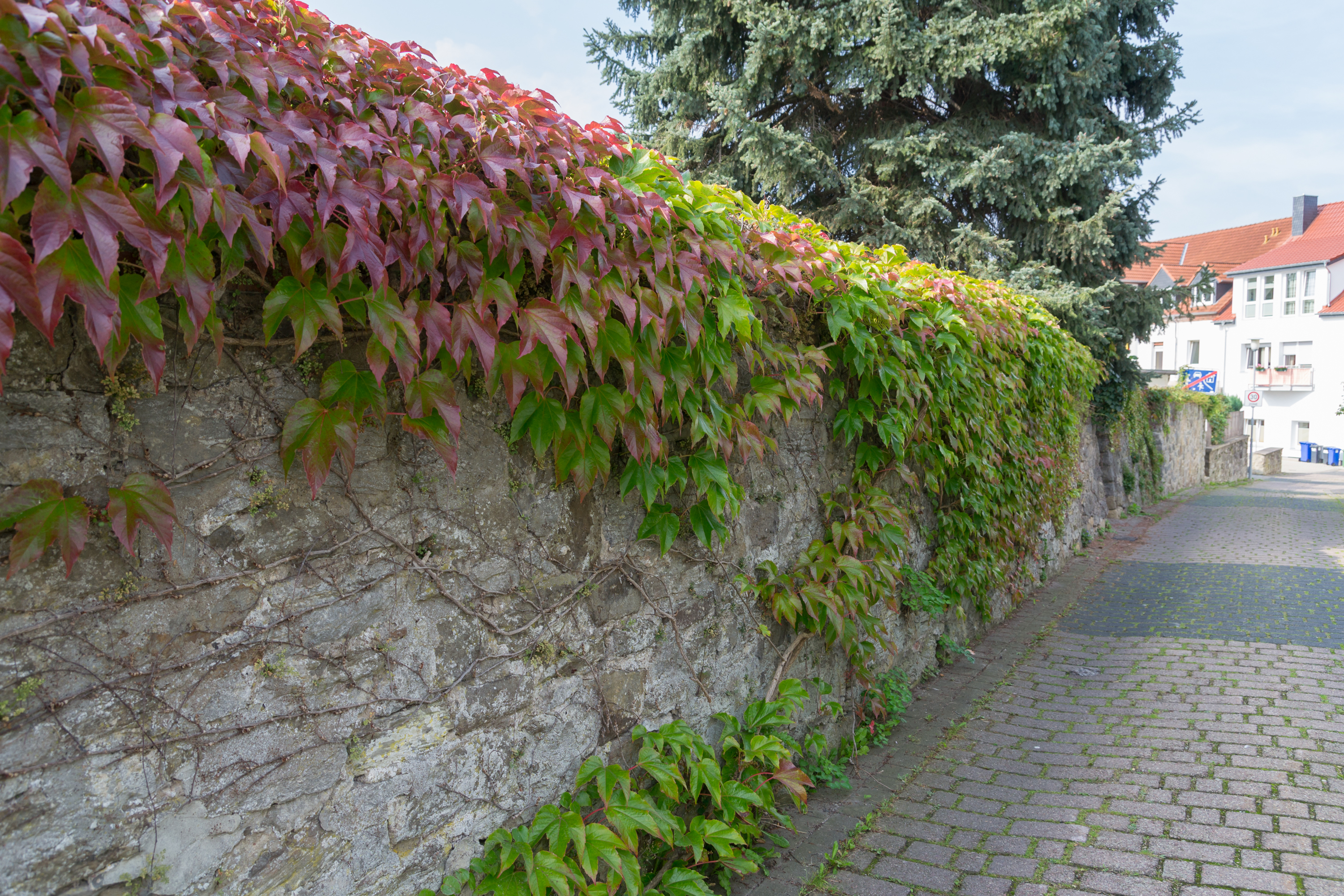 This image shows a heritage building in Germany, located in the North Rhine-Westphalian city Steinheim (Westfalen) (no. 9). Teilstück Stadtmauer